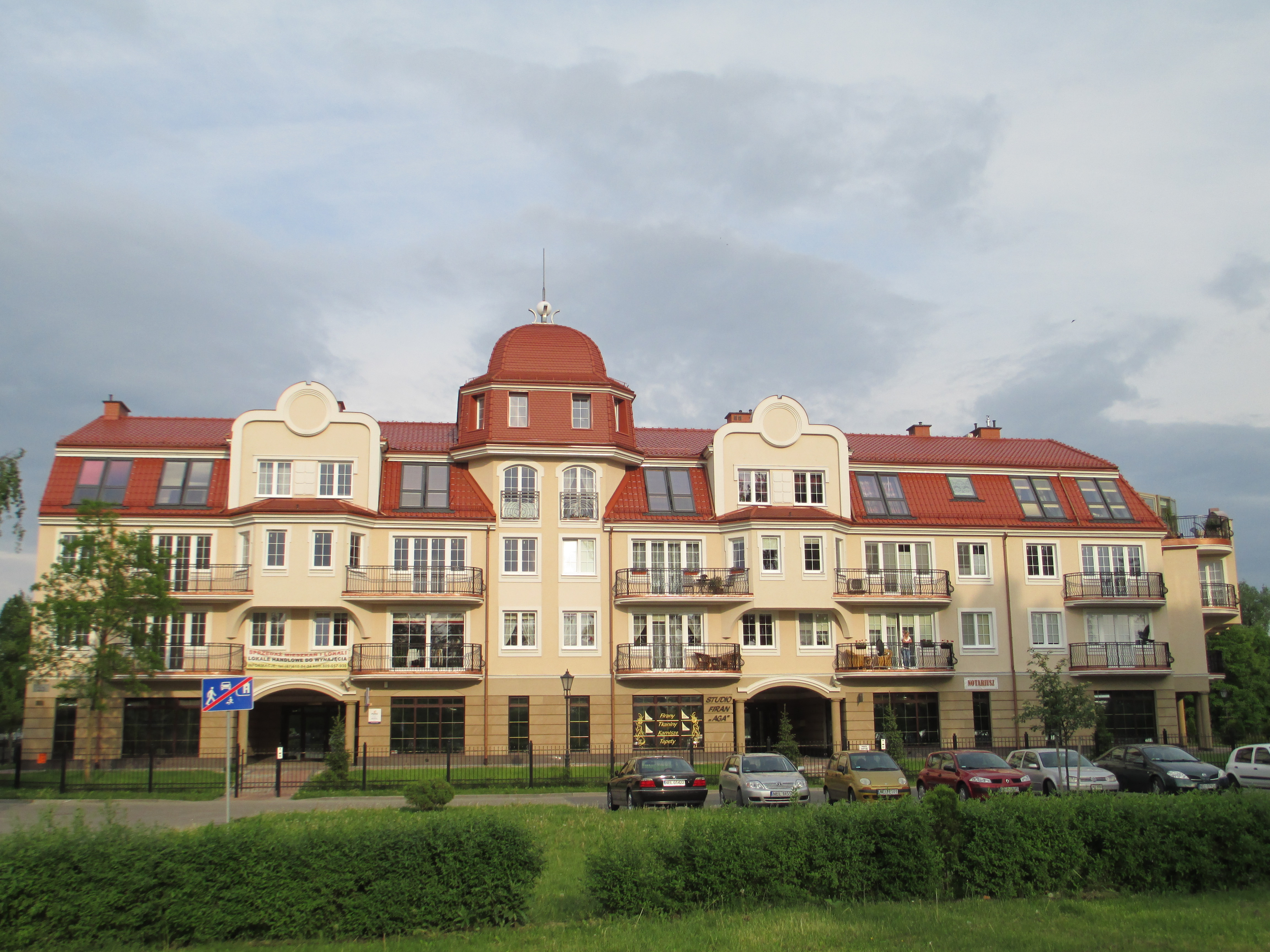 Ełk - Apartamentowiec Villa Park